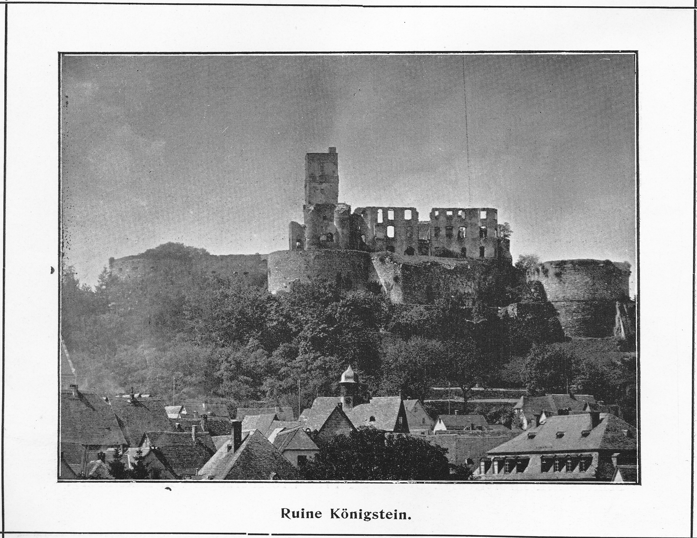 Bildunterschrift: Ruine Königstein